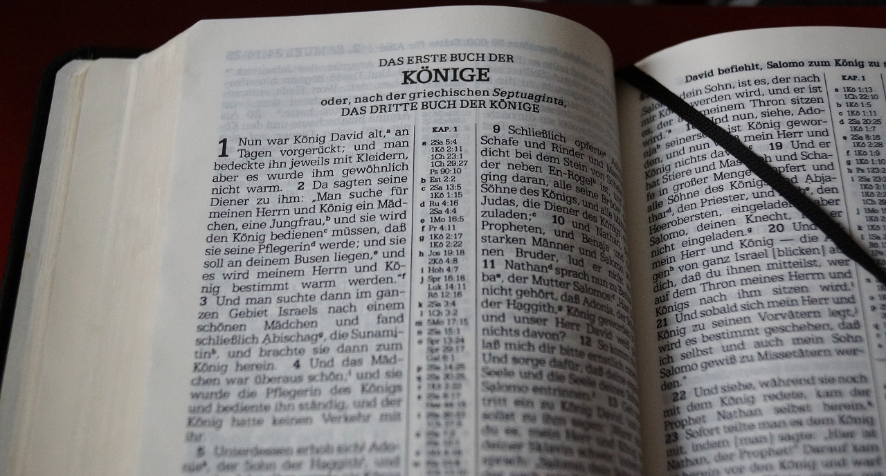 Neue-Welt-Übersetzung der Heiligen Schrift (Innenseite)